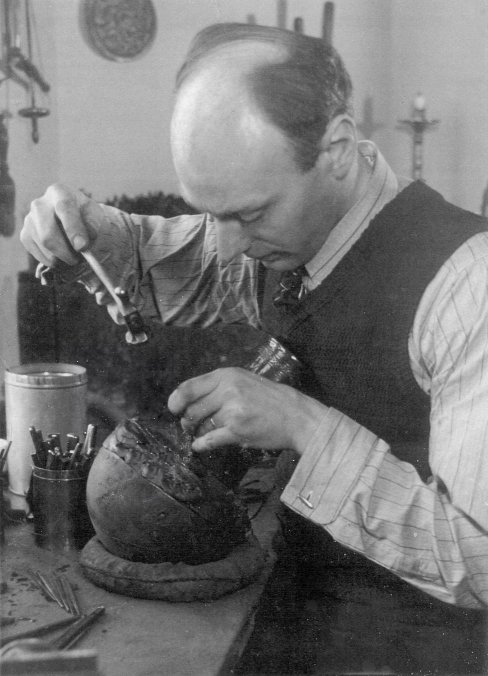 Marinus Zwollo aan het ciseleren, metaaldrijven.